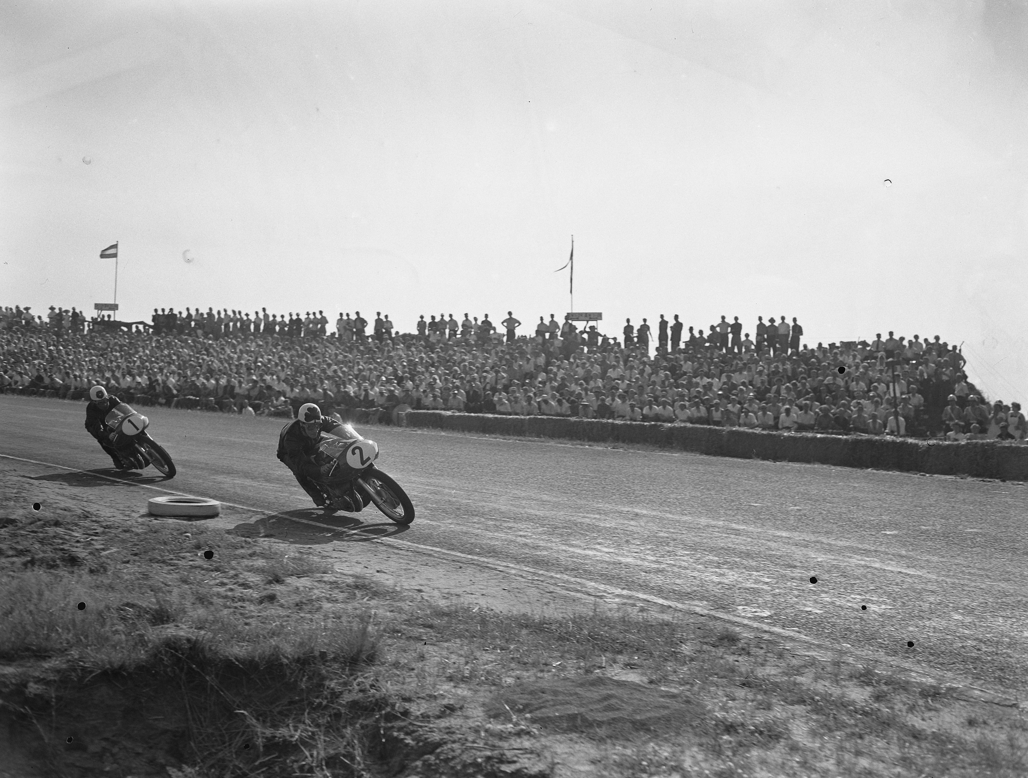 Collectie / Archief : Fotocollectie Anefo Reportage / Serie : TT Assen 1955 Beschrijving : Coureurs in de bocht Annotatie : 500cc Reg Armstrong (2), Geoff Duke (1) Datum : 16 juli 1955 Locatie : Assen Trefwoorden : motorsport Instellingsnaam : TT Fotograaf : Pot, Harry / Anefo Auteursrechthebbende : Nationaal Archief Materiaalsoort : Negatief (zwart/wit) Nummer archiefinventaris : bekijk toegang 2.24.01.04 Bestanddeelnummer : 907-2366